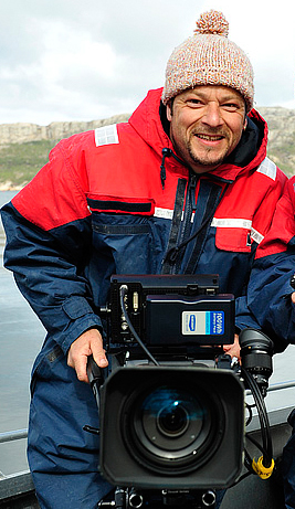 Jan Haft beim Dreh zu Wildes Skandinavien